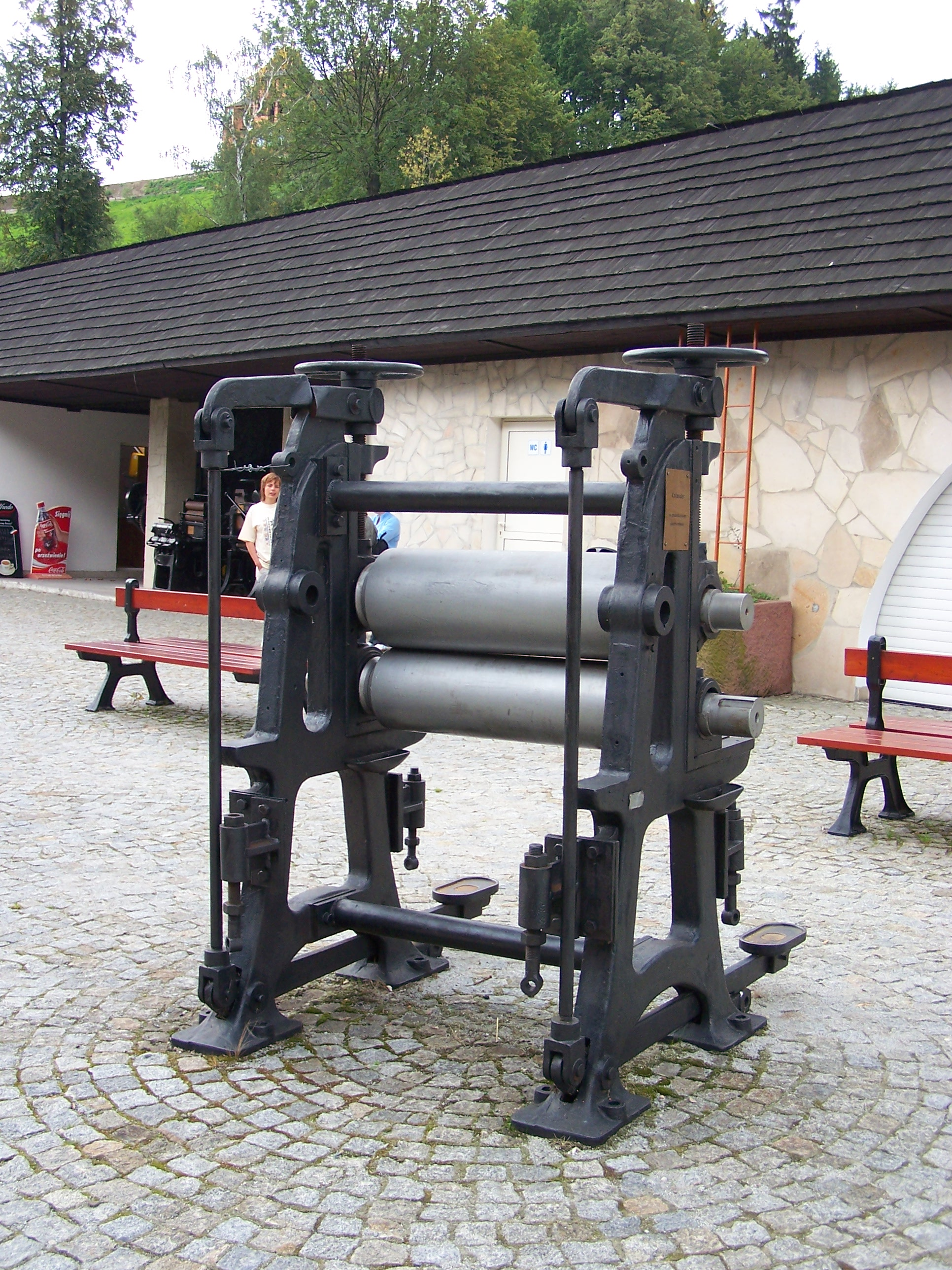 Kalander - urządzenie do gładzenia arkuszy papieru i tektury.